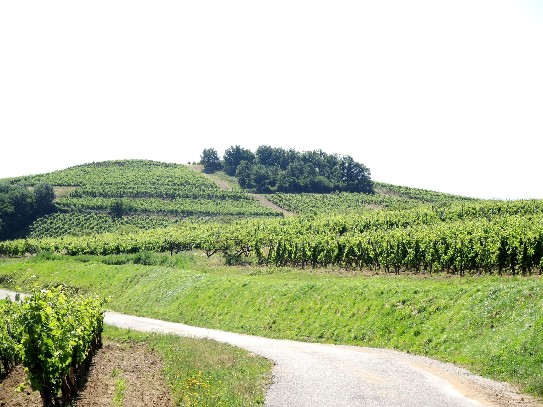 Limony détail